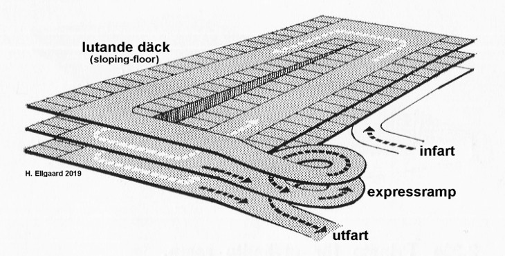 P-hus, lutande däck med expressramp, principskiss.källa: ”Parkeringsanläggningar” utgiven av Ingenjörsvetenskapsakademin (1969).